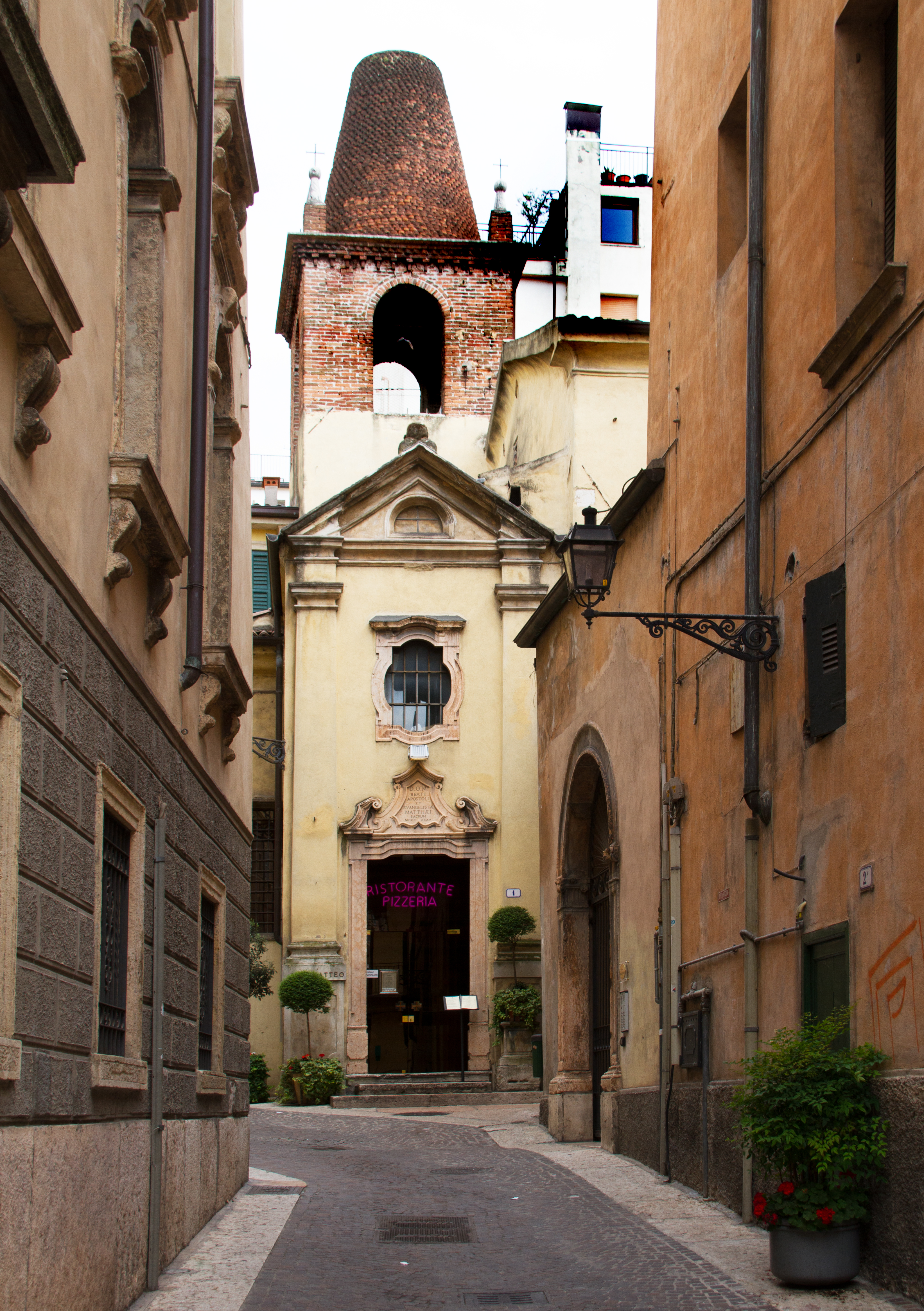 Verona 8